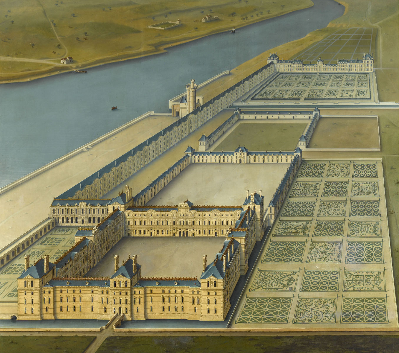 Grand dessein d’Henri IV (château du Louvre), vers 1600-1615. Carte murale par Louis Poisson.